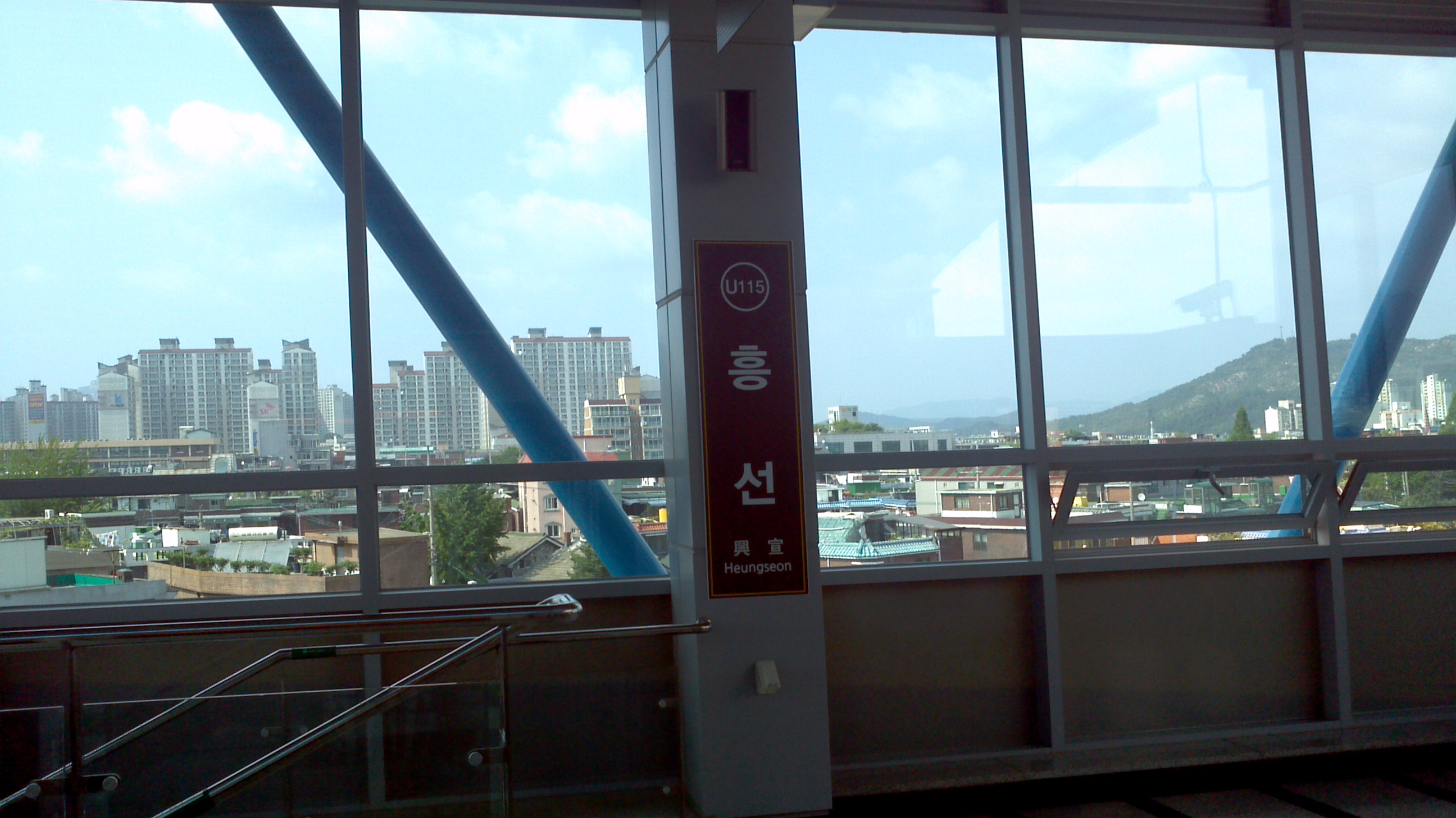 범골역 역명판